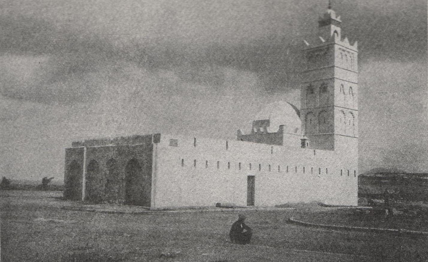 Oran - Mosquée du bey Mohamed el Kebir, dite "Vieille Mosquée" sur le plateau de Karguentah, en 1920 - La mosquée n'est pas encore entourée d'immeubles. Au fond, à droite, la "Montagne des Lions".